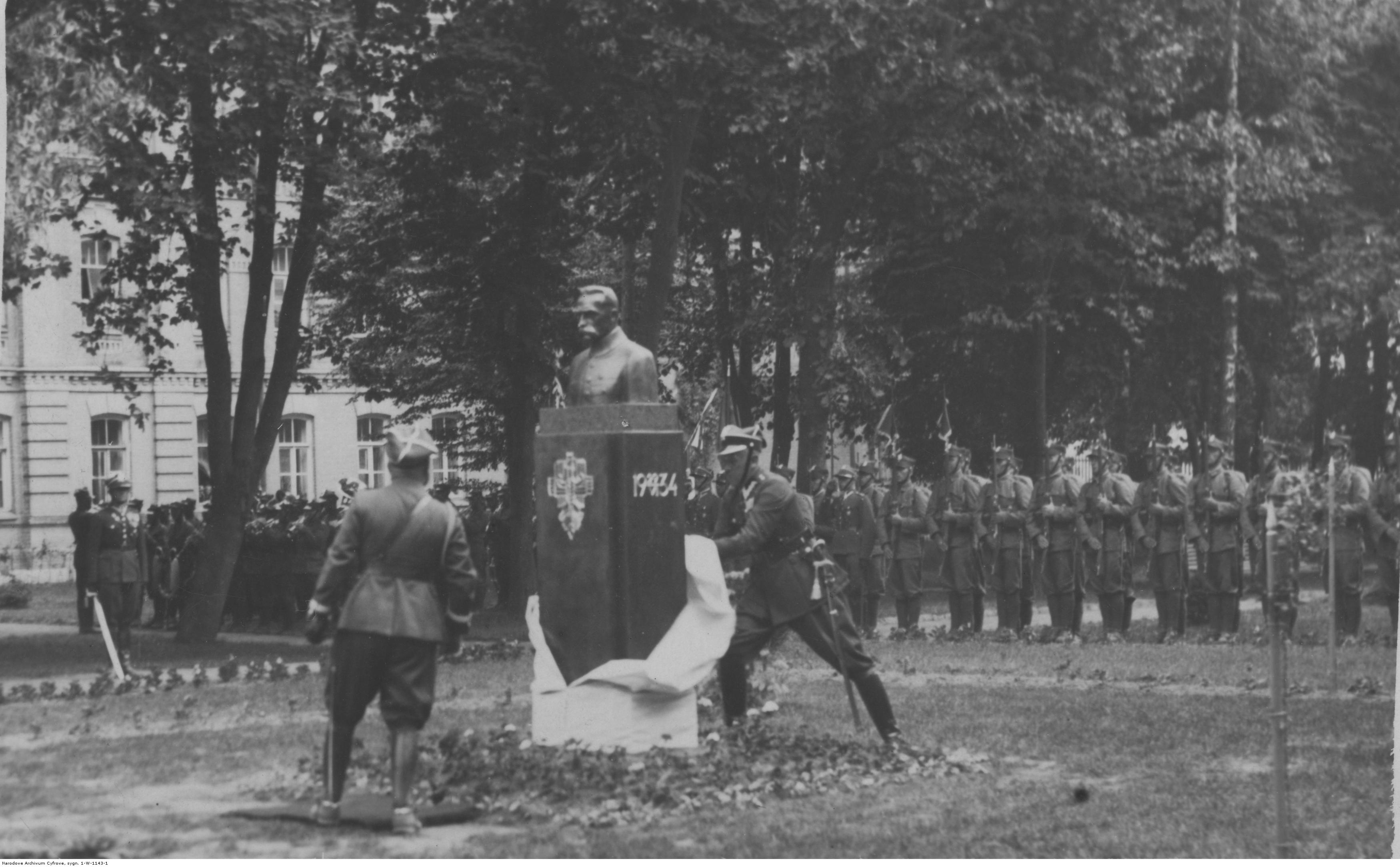 Święto 13 Dywizji Piechoty w Równem - odsłonięcie pomnika marszałka Józefa Piłsudskiego; lipiec 1934. Koncern Ilustrowany Kurier Codzienny - Archiwum Ilustracji. Sygnatura: 1-W-1143-1